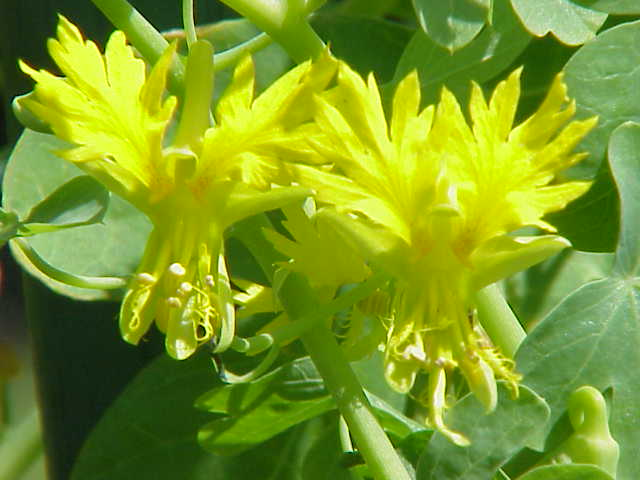 Species: Tropaeolum peregrinum (var. peregrinum) Family: Tropaeolaceae Image No. 2